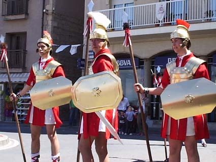 Manaies de Figueres al Triumvirat de l'Escala